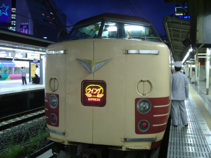 183계 전동차로 운행되었던 윙 익스프레스.